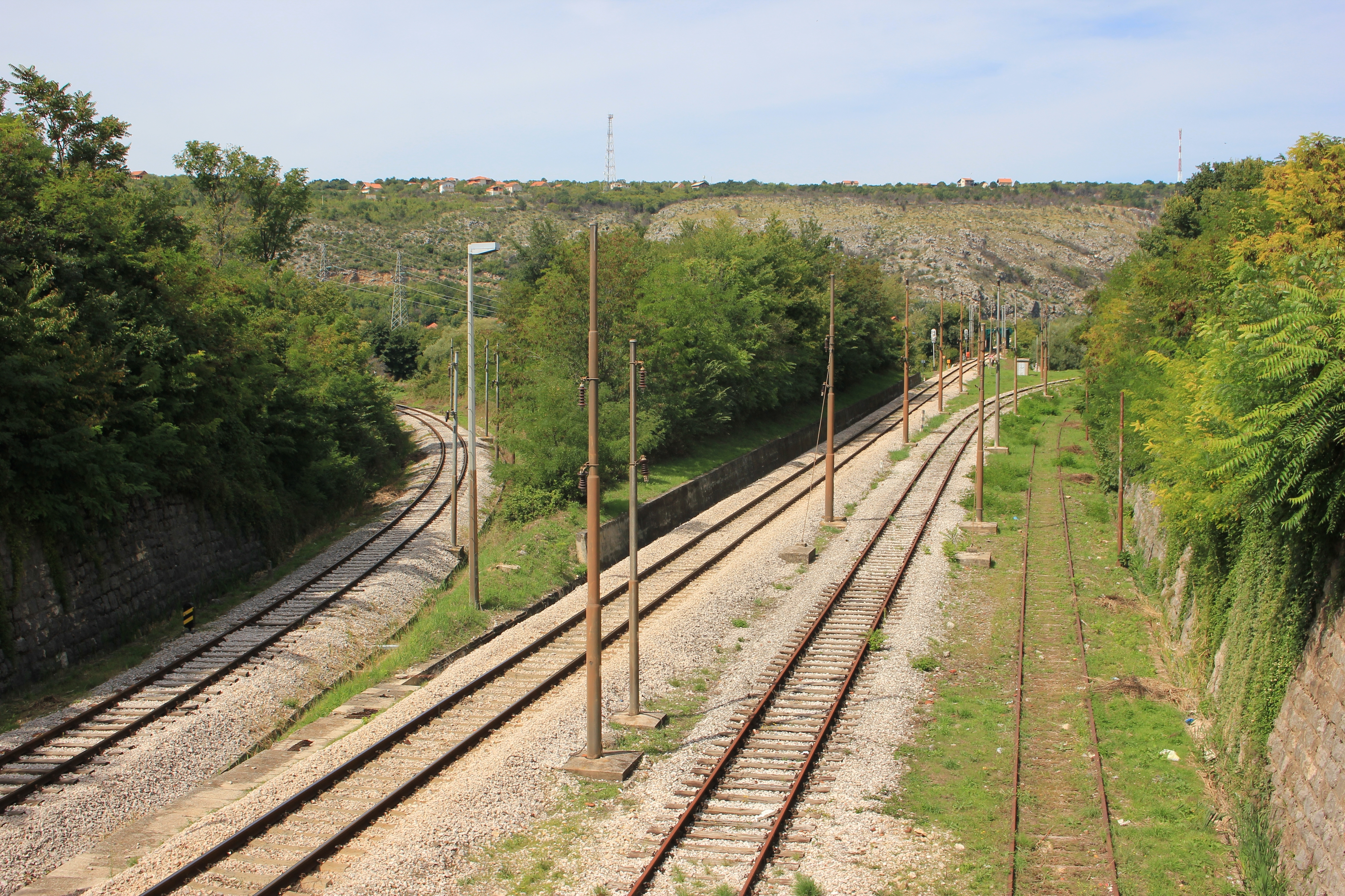 Verzweigung der Strecken nach Split (links), Oštarije und Bihać (Una-Bahn) am Bahnhof Knin.